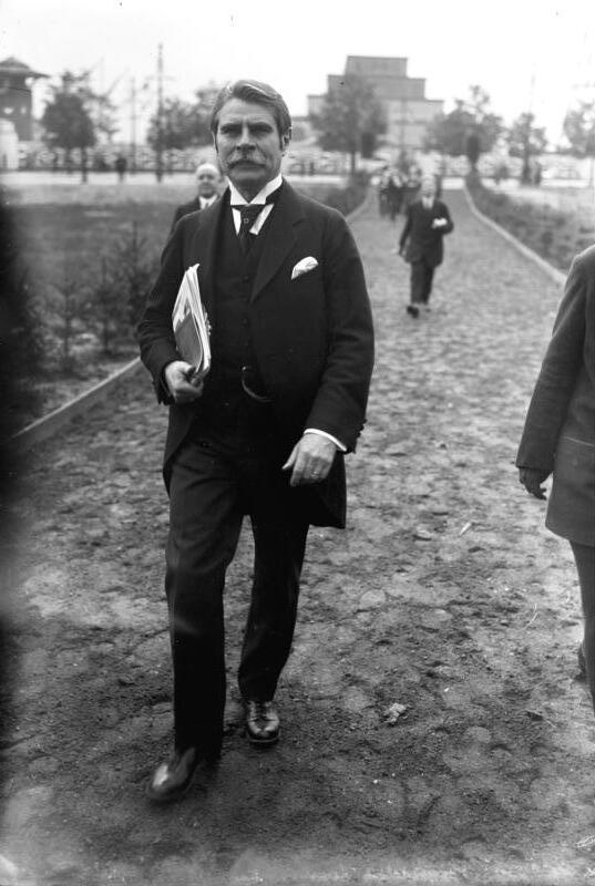 Der bekannte Kunstmaler Prof. Baluschek 60 Jahre alt! Porträtaufnahme des bekannten Kunstmalers Prof. Baluschek.